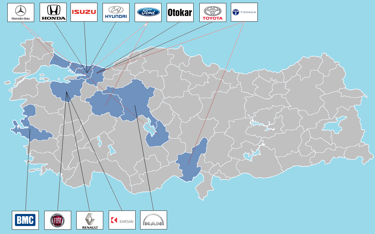 Otomobil Fabrikaları